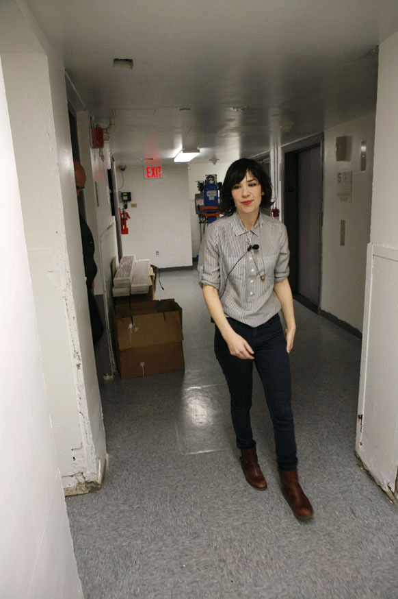 Photo By Kent Derek